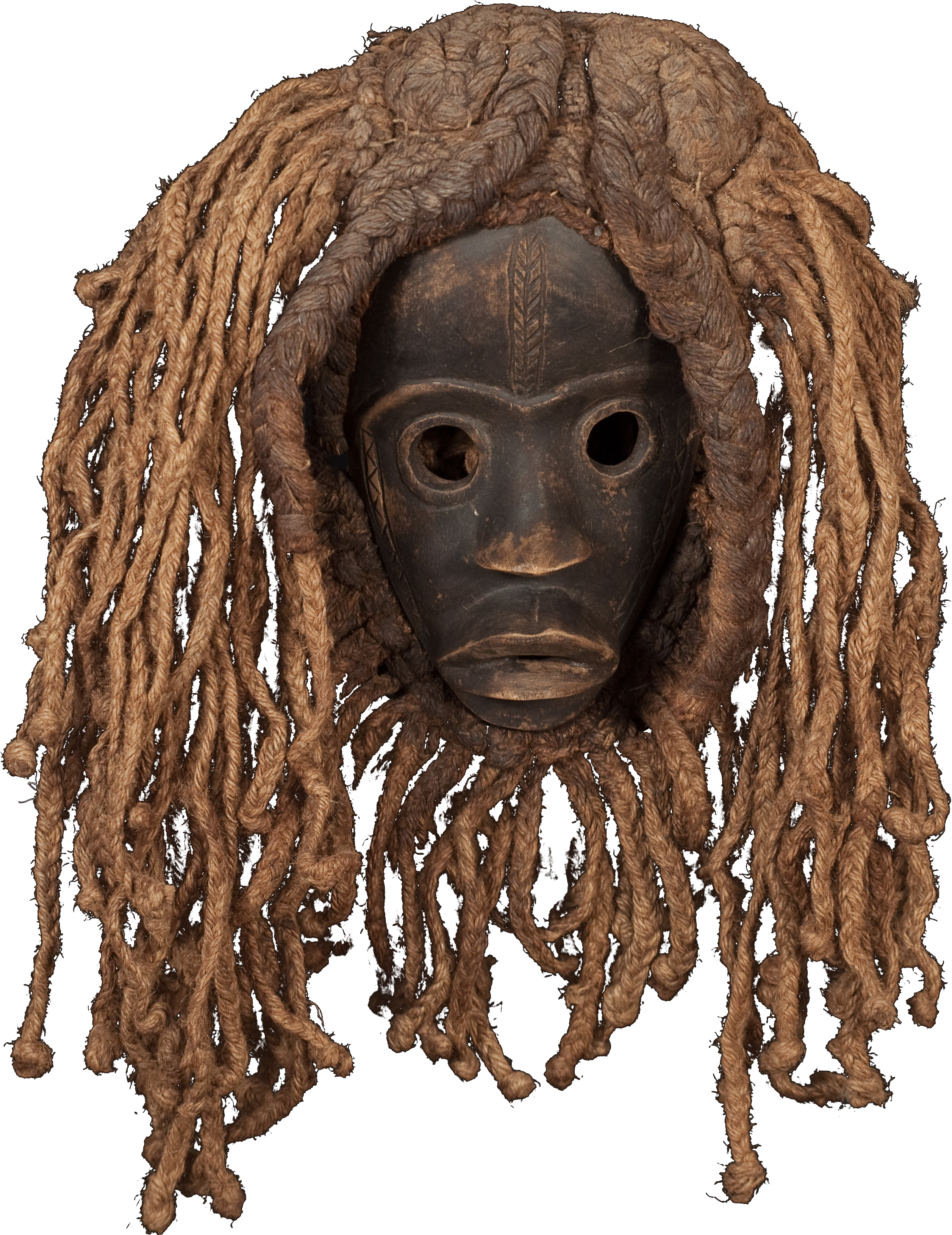 Masque dan